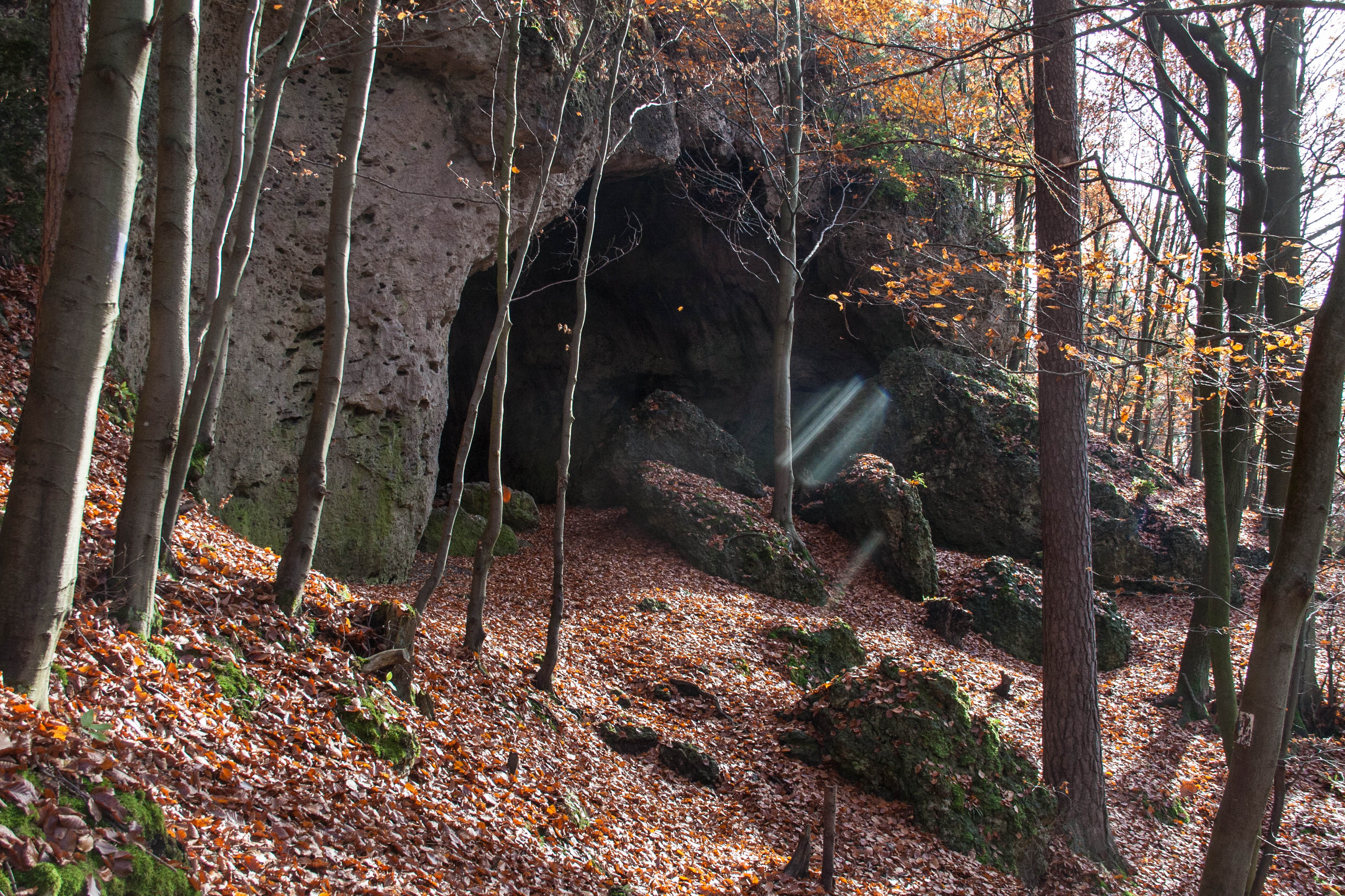 Sonnenuhr, A 32, Höhle, Königstein